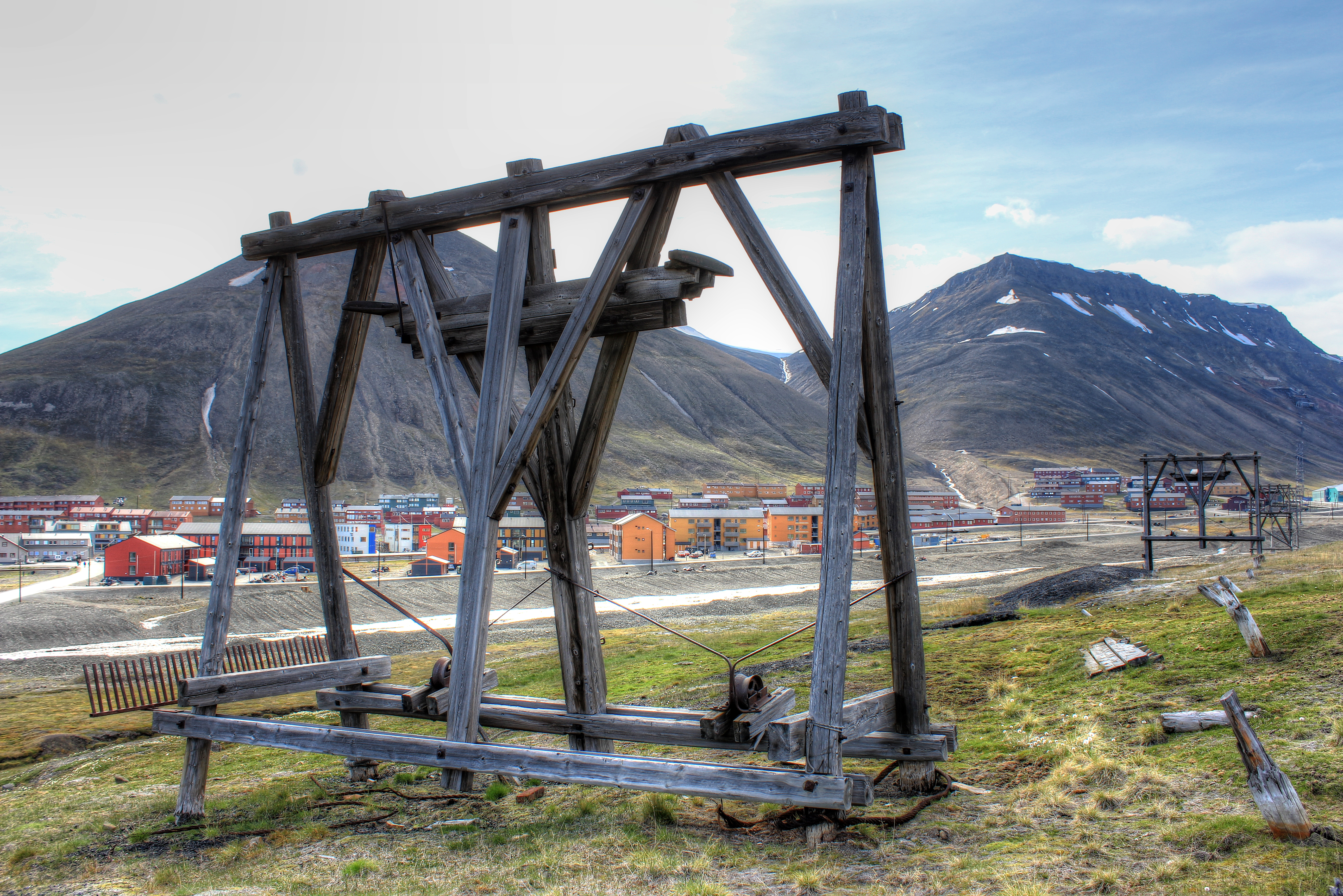 Svalbard, Longyearbyen, Taubanelinje